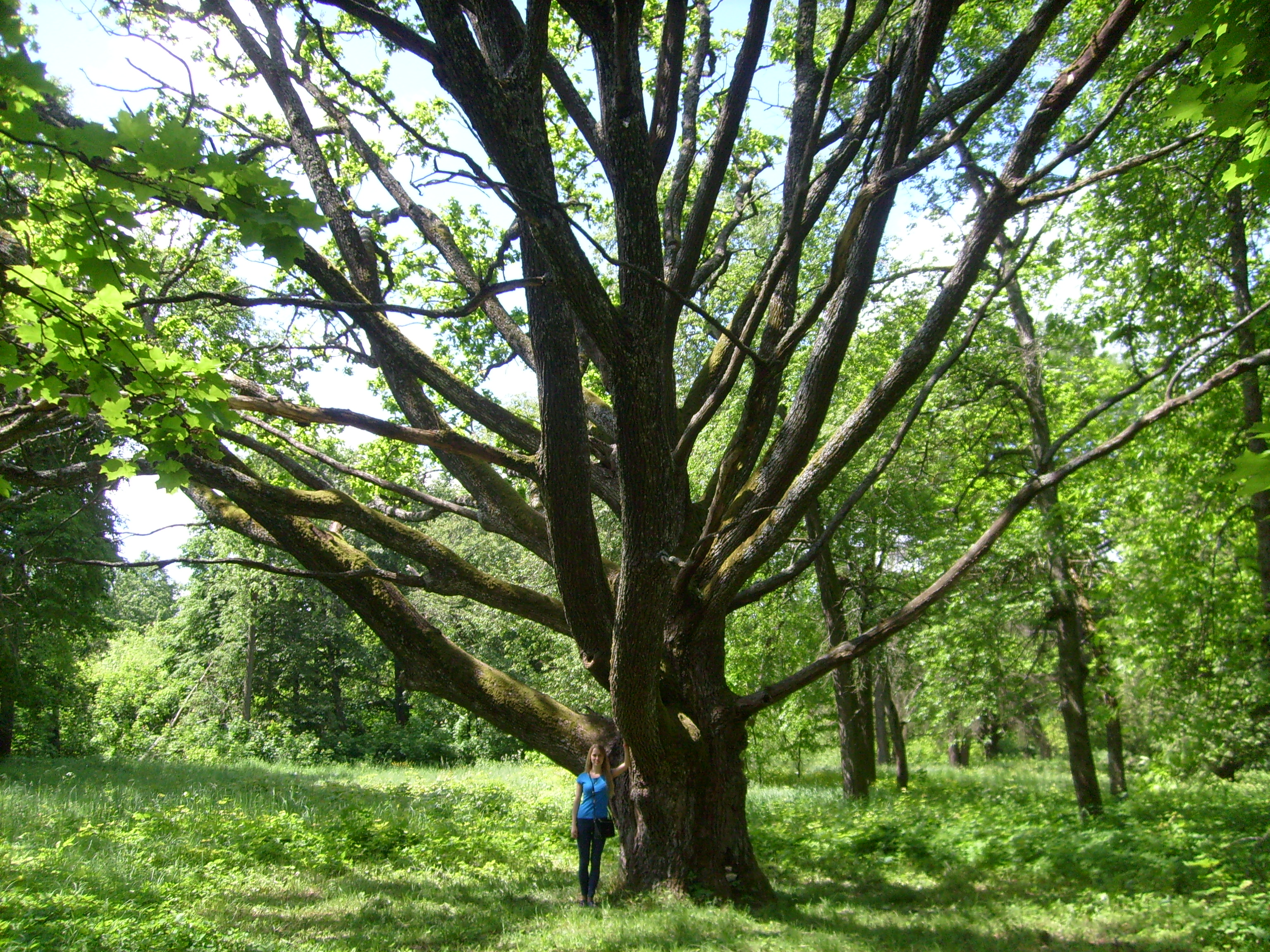 Двухсотлетнее дерево в Грудиновке